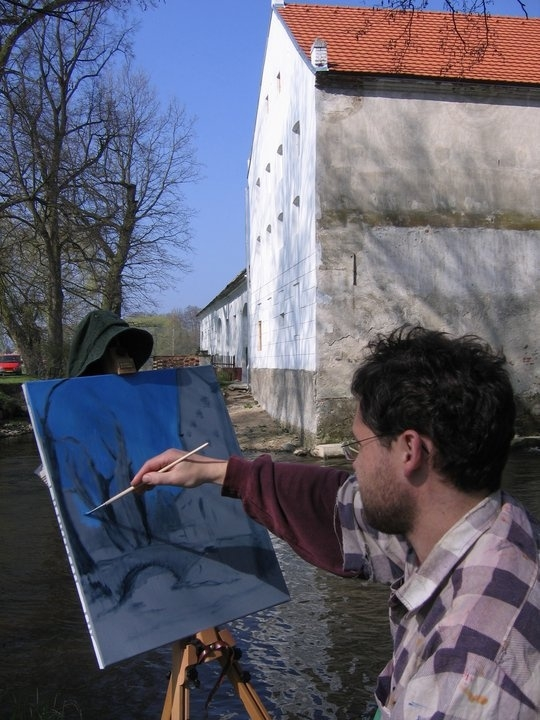 plenérová tvorba na Mosteckém mlýně (ku příležitosti zahájení, r. 2010)